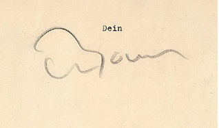 Wolfgang Bauer Signatur 1962 Ausschnitt aus Bauers Weihnachtswünschen an Lois veröffentlicht bei